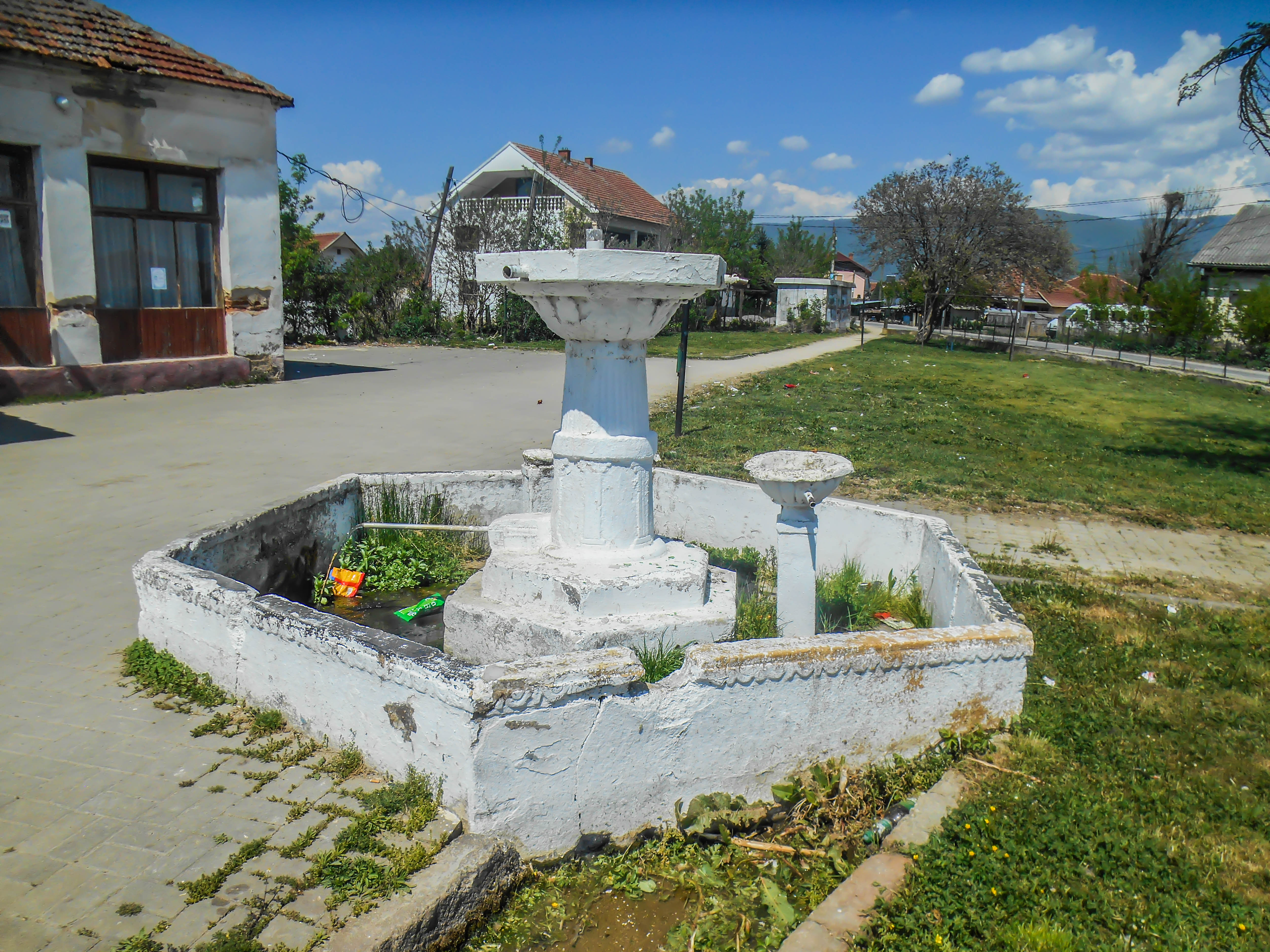 Селска чешма - Секирник